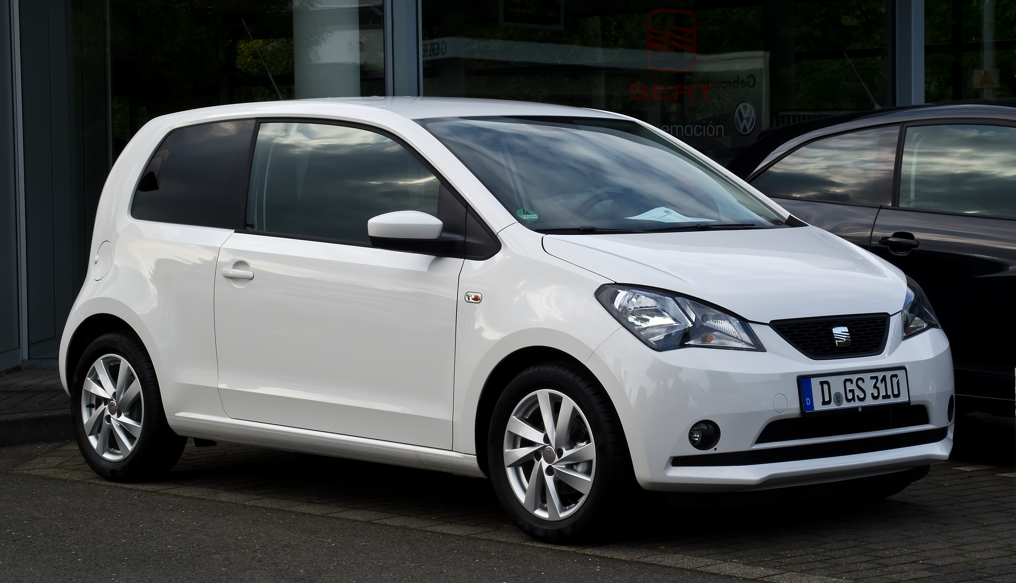 Seat Mii 1.0 Style